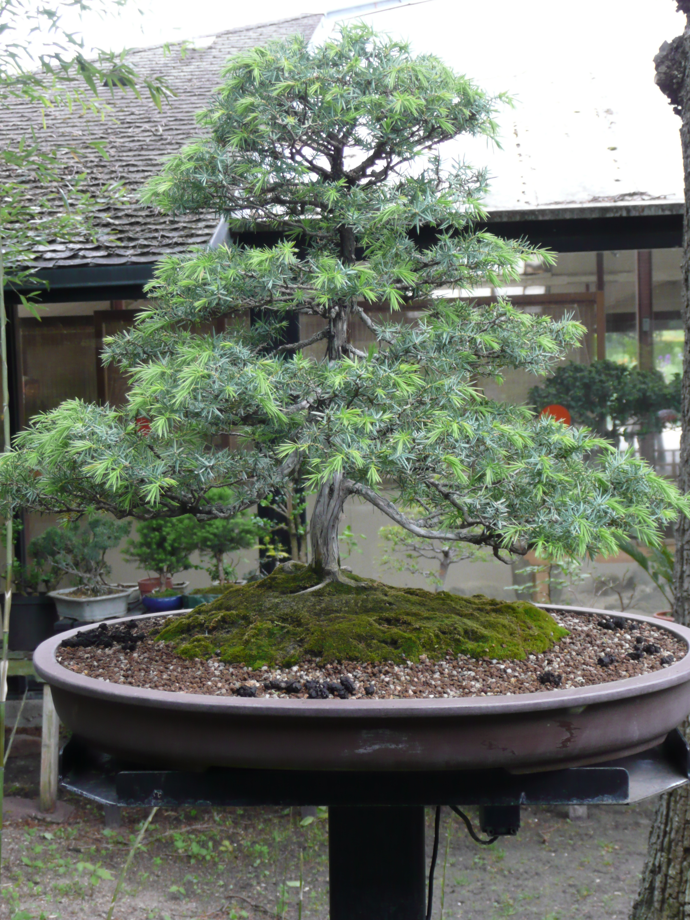 Juniperus communis bonzai in Serre des bonsaïs in Parc floral de Paris Map: 48° 50' 19" N 2° 26' 33" E